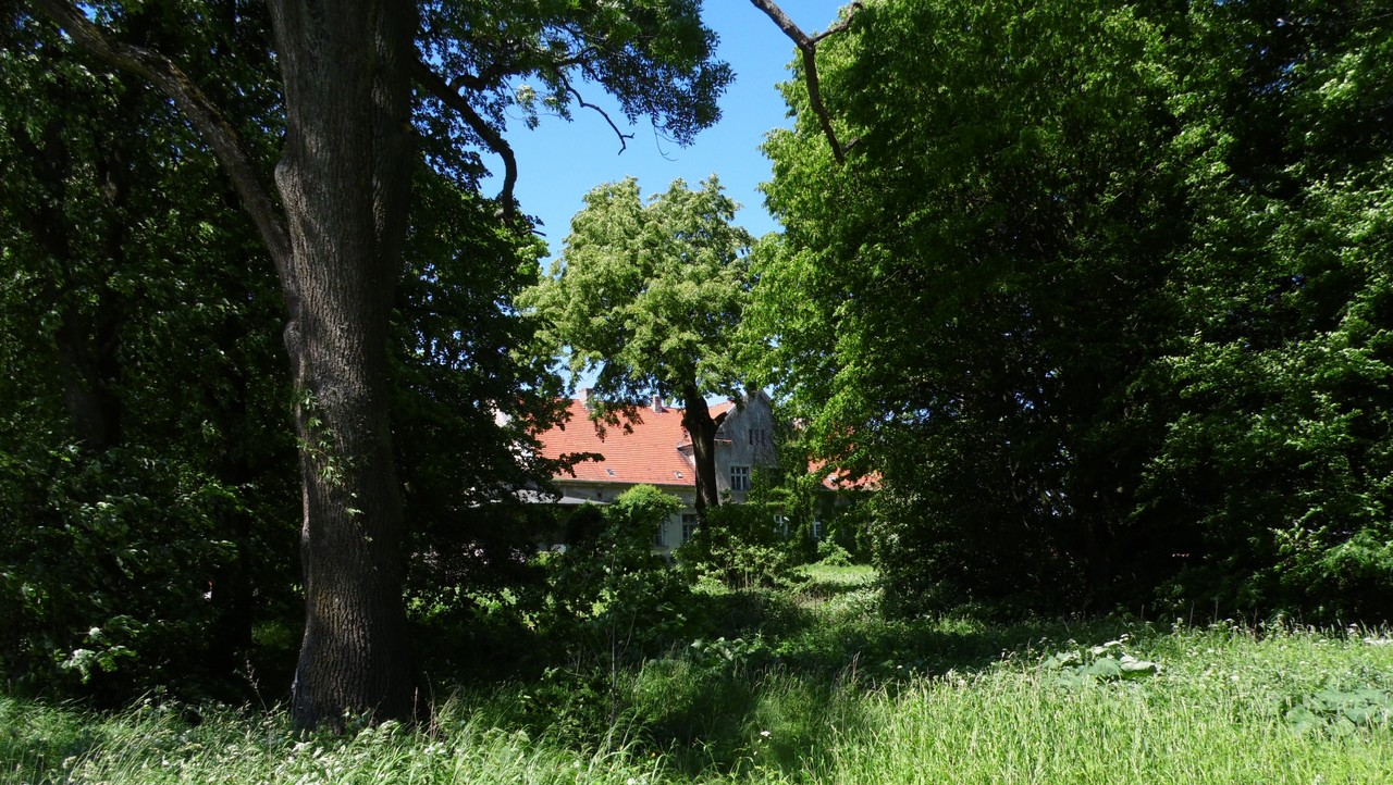 PAŁAC W PARKU.